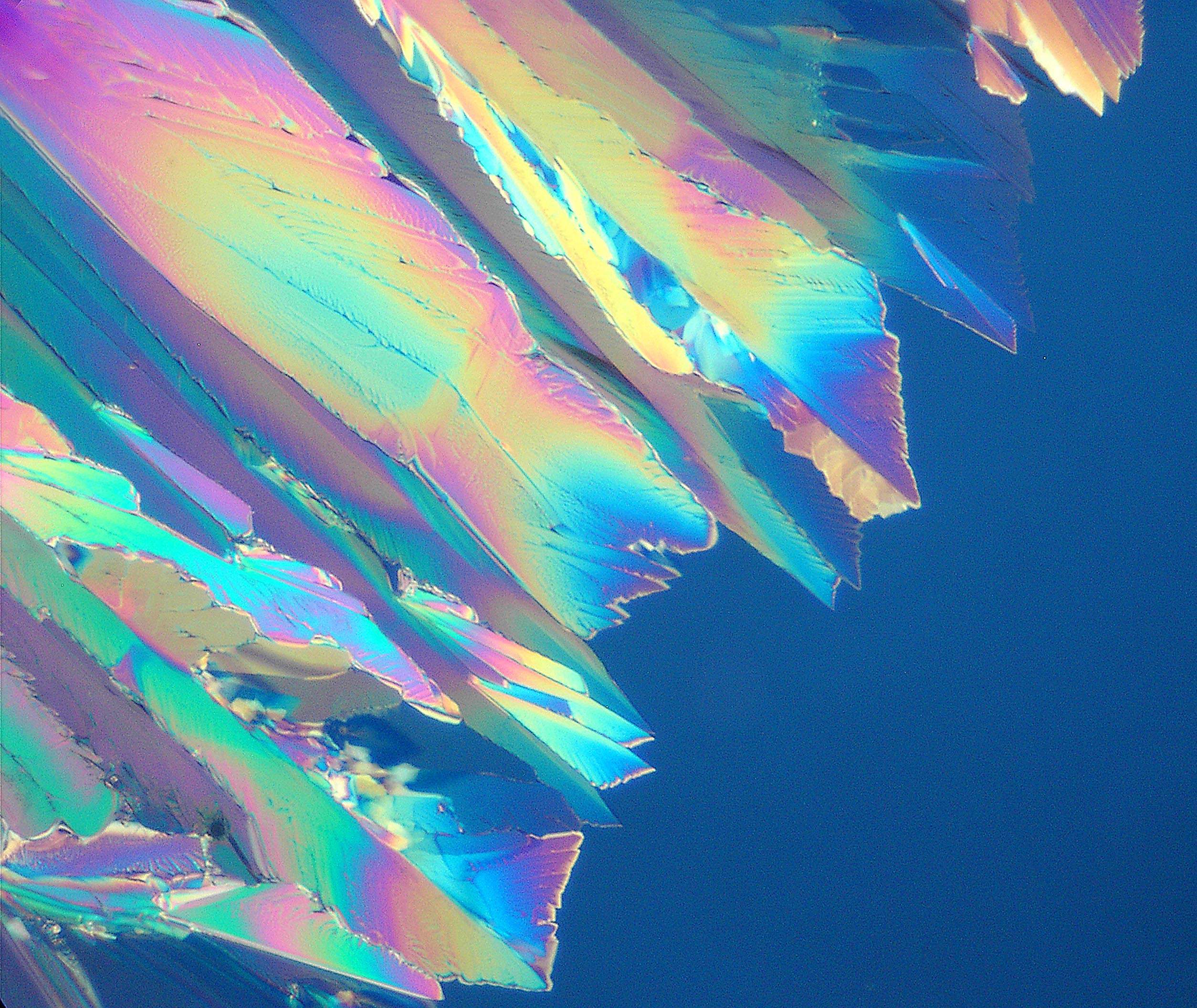 Zitronensäure bei 200 fach mit Polfilter. Ausschnitt ca: 700µm x 700µm